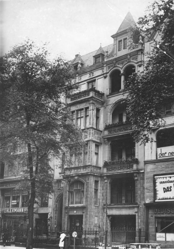 Berlin, Chinesische Gesandtschaft ADN-ZB Berlin 1935: Die chinesische Gesandtschaft, Kurfürstendamm 218. 17029-35